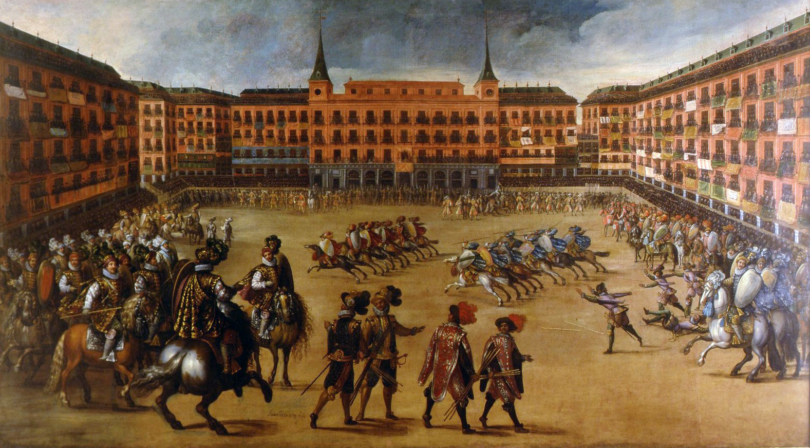 Fiestas en la Plaza Mayor de Madrid, 1623.